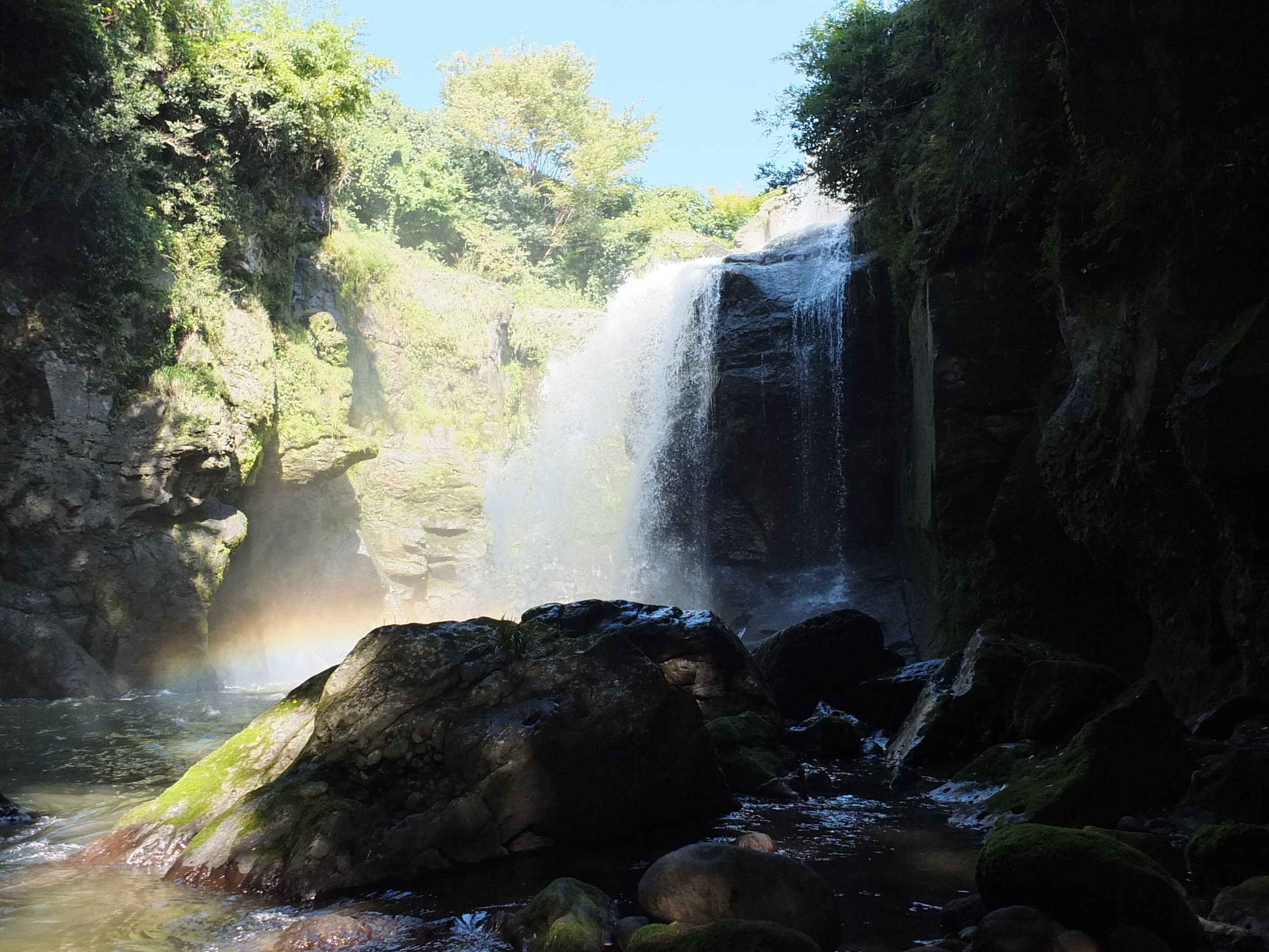 黄牛の滝その2